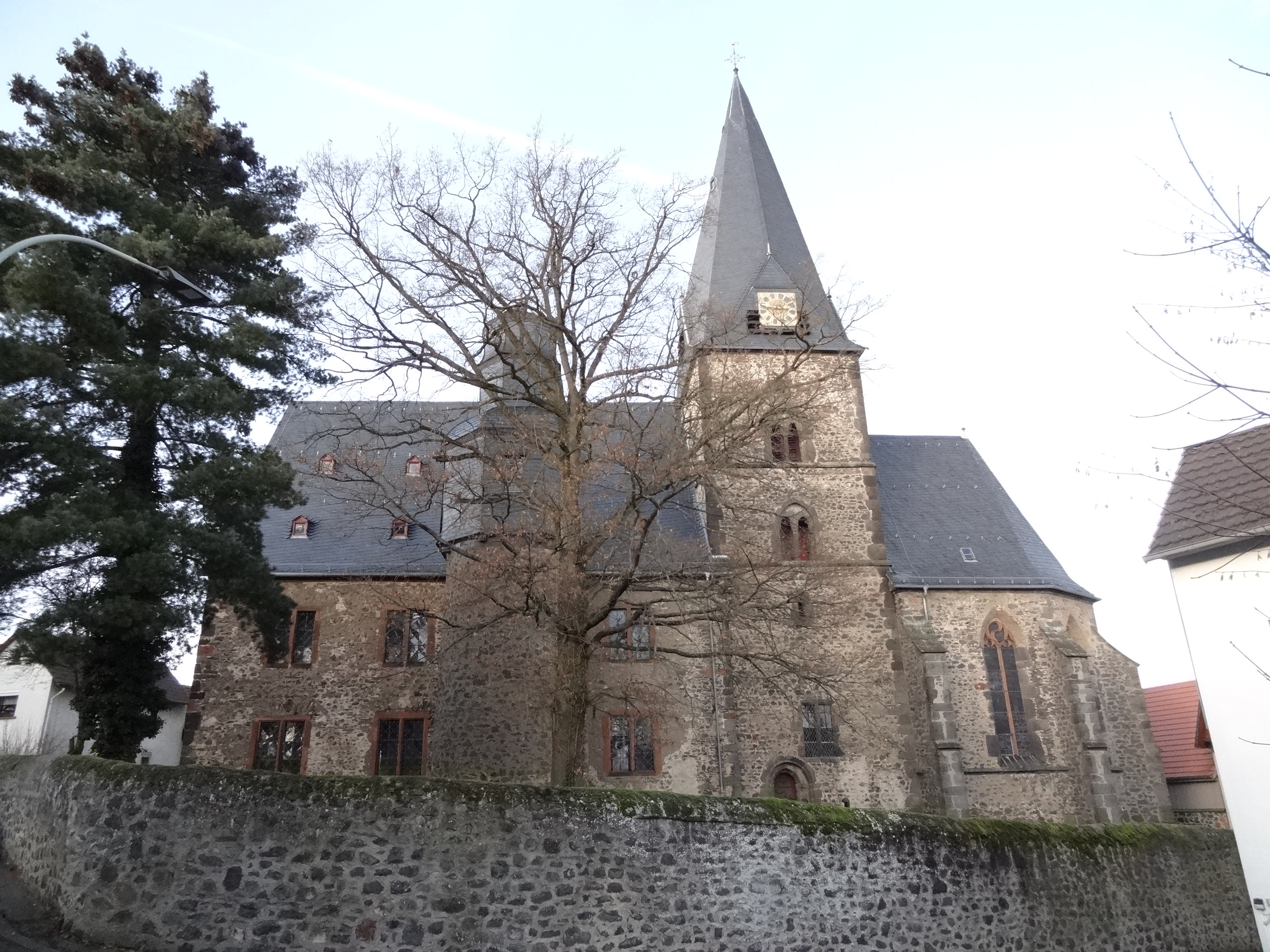 Evangelische Stadtkirche Hungen